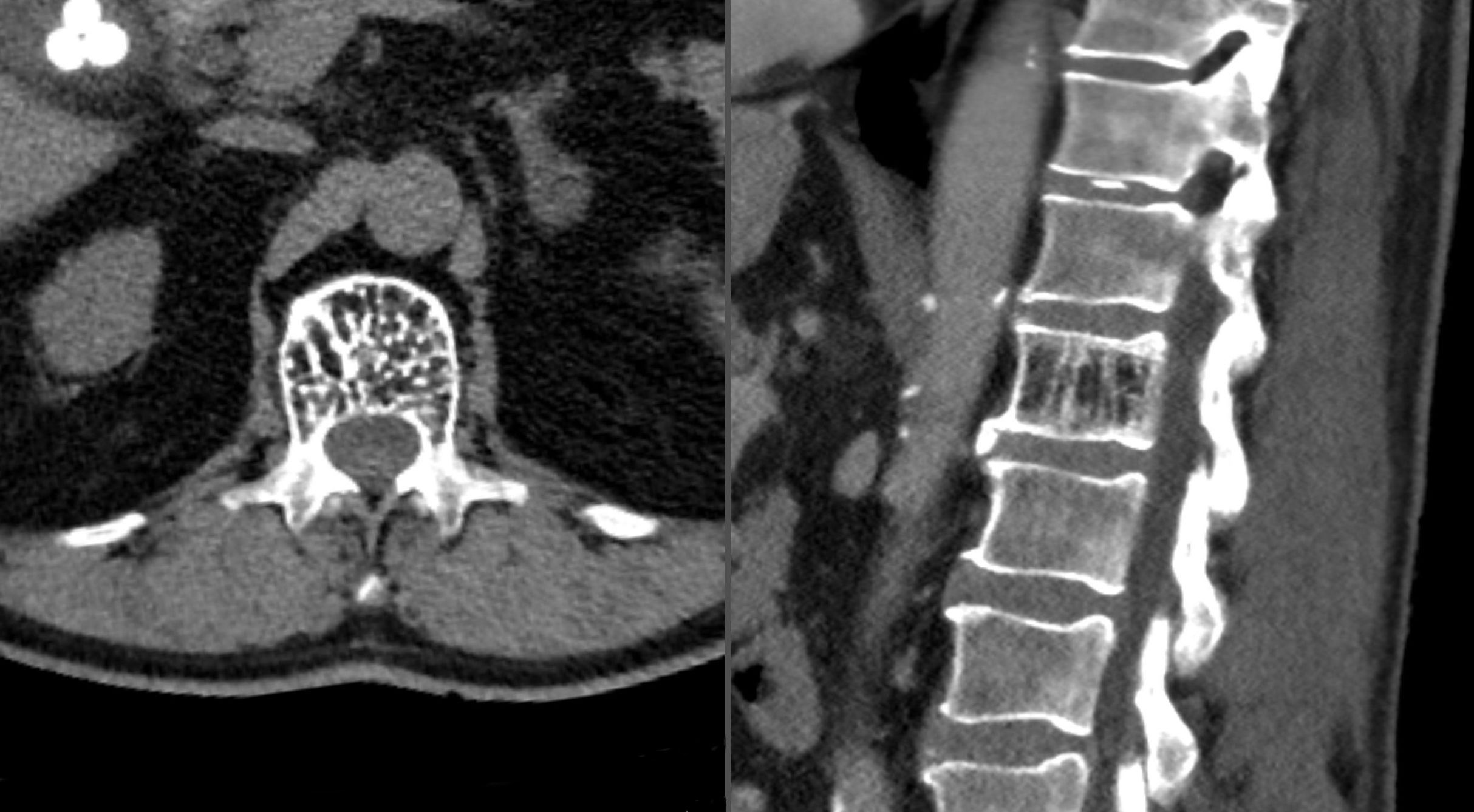 Hämangiomwirbel in der Computertomographie axial und sagittal rekonstruiert. Man erkennt gut die rarefizierten, verdickten, vertikal orientierten Trabekel. Eine Dichtemessung zwischen den Trabekeln ergibt negative Hounsfield-Werte (Fett).